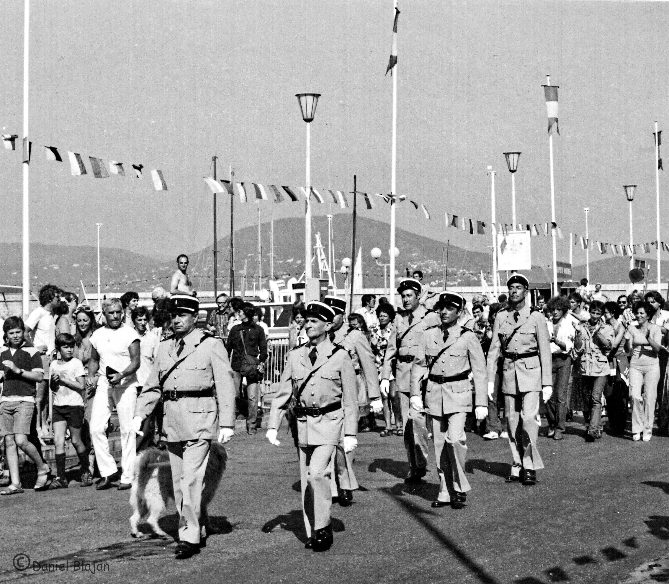 Tournage du défilé final du film Le Gendarme et les Extra-terrestres en 1978, à Saint Tropez, avec les acteurs Michel Galabru, Louis de Funès, Maurice Risch, Michel Modo, Guy Grosso et Jean-Pierre Rambal.